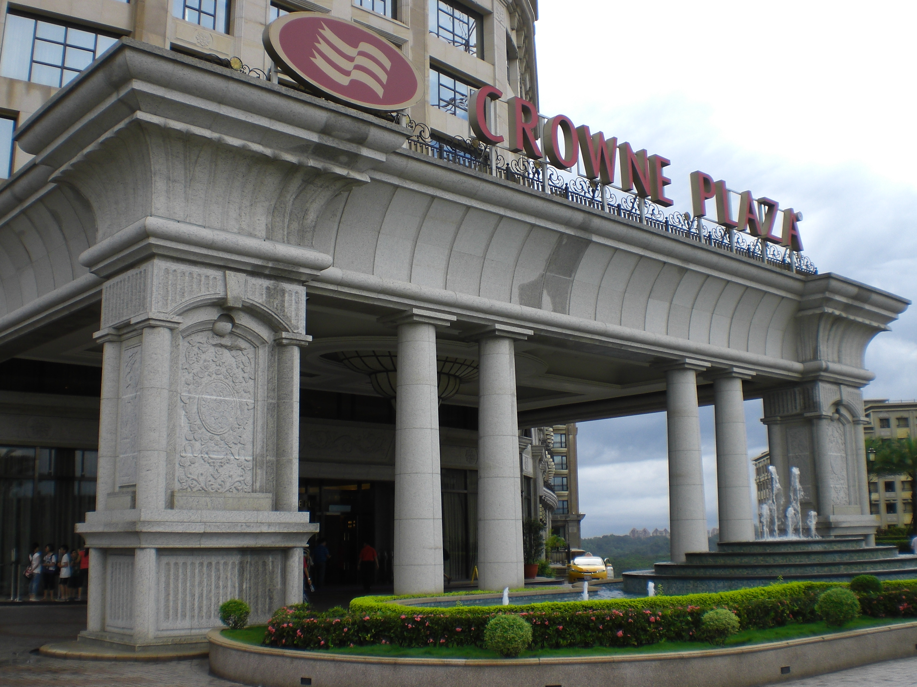 2013年5月18日的高雄義大皇冠假日飯店大門